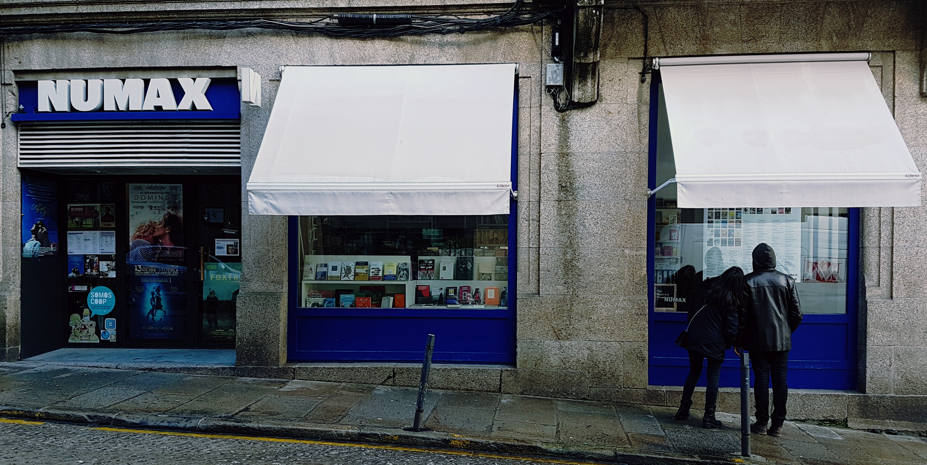 Acceso á sala NUMAX na rúa Concepción Arenal de Santiago de Compostela.